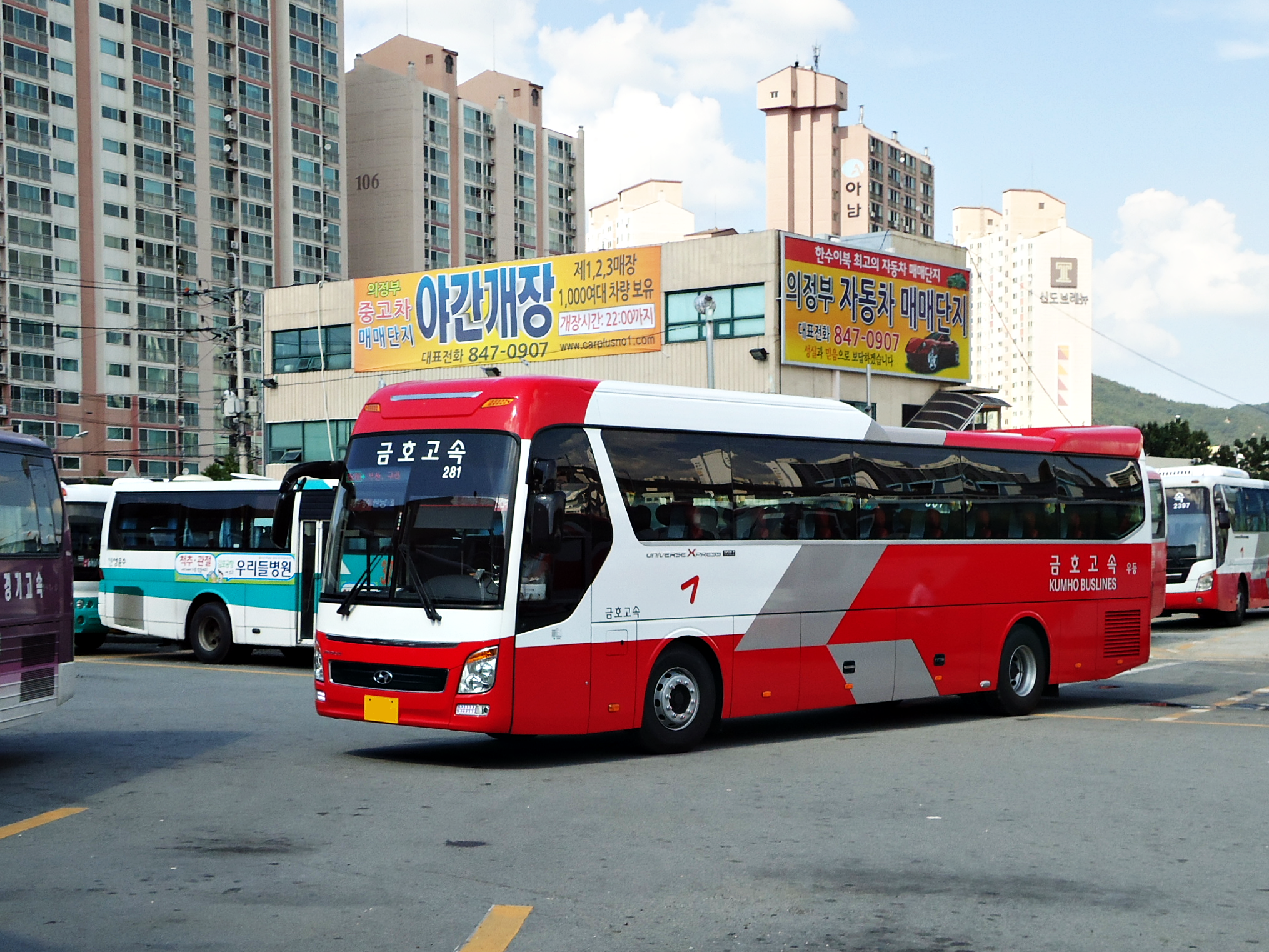 금호고속 뉴 프리미엄 유니버스 익스프레스 노블 2013년식(8월 경에 출고).